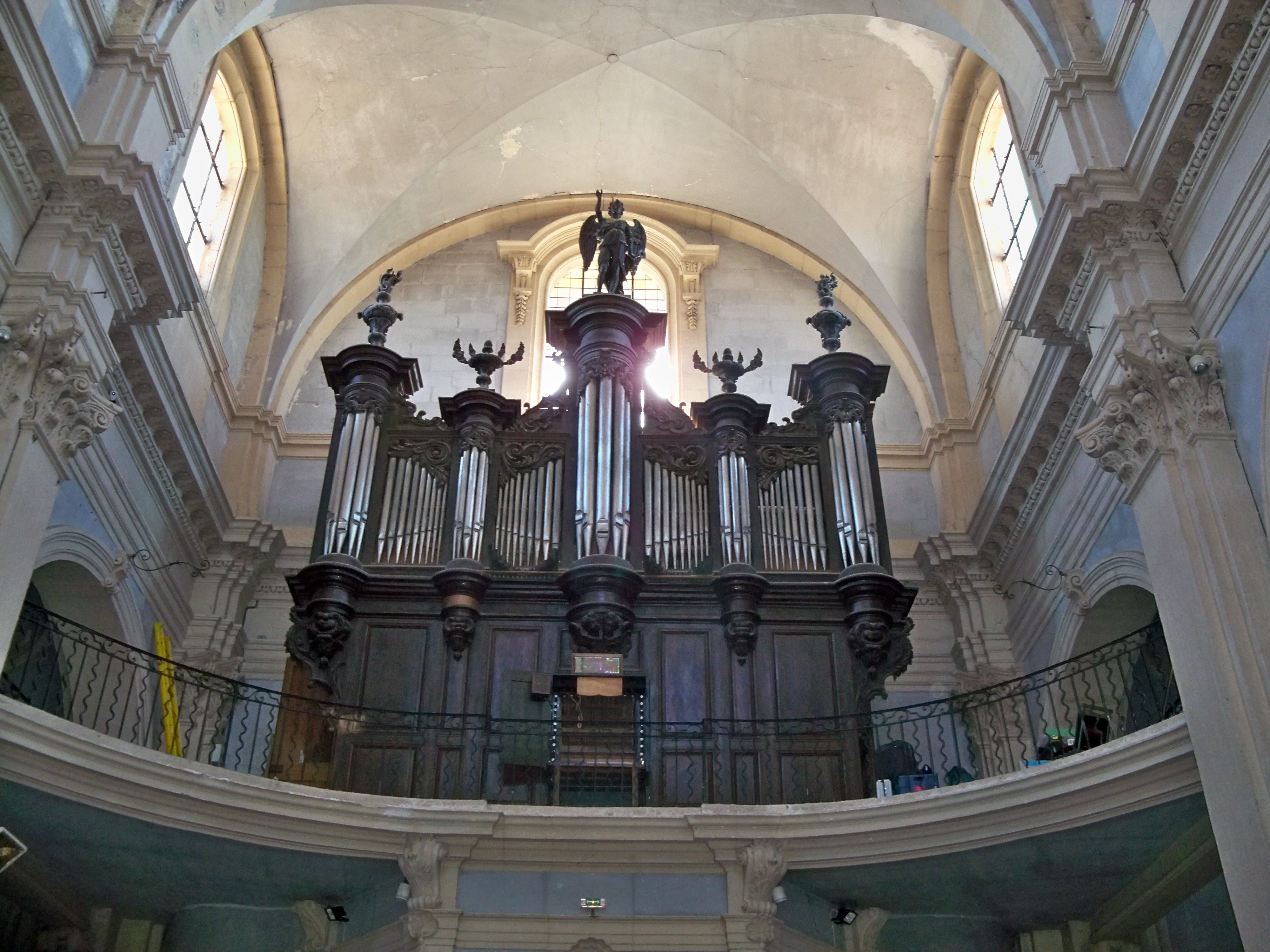 Orgue de Notre Dame de l'Assomption de Lambesc, Bouches du Rhône, France